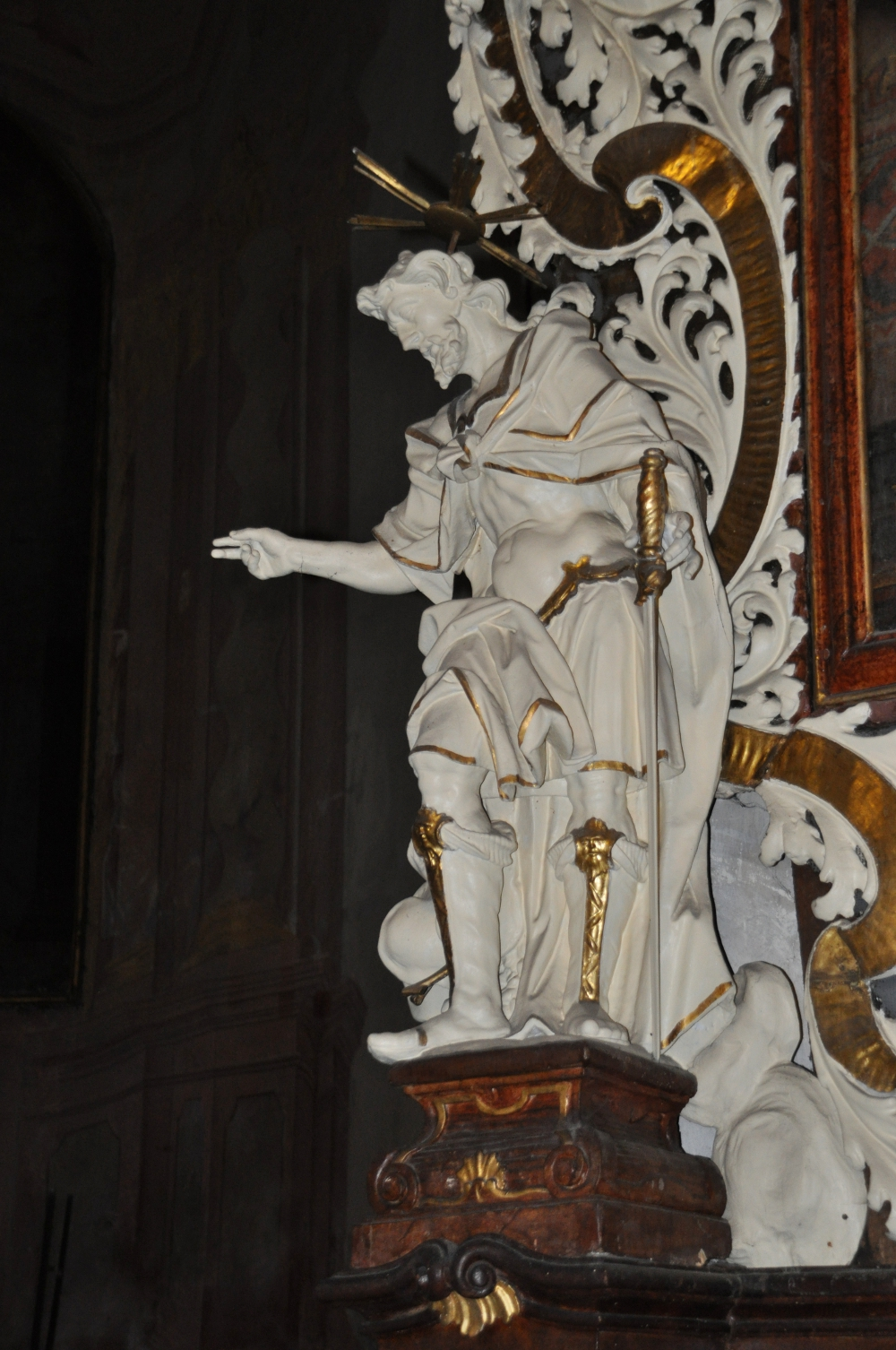 kostel sv. Petra a Pavla - interiér